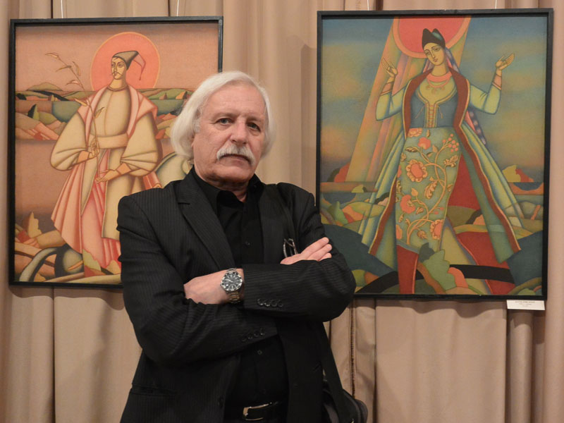 Івахненко